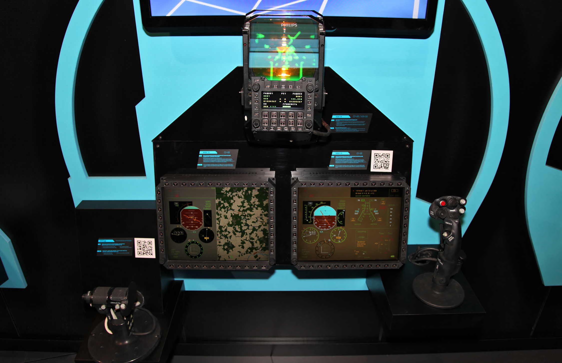 Оборудование кабины Су-35: коллиматорный авиационный индикатор, многофункциональные индикаторы, комплект рукояток управления самолетом и двигателями (Su-35 avionics: head-up display, displays, aircraft control stick and throttle control knobs)